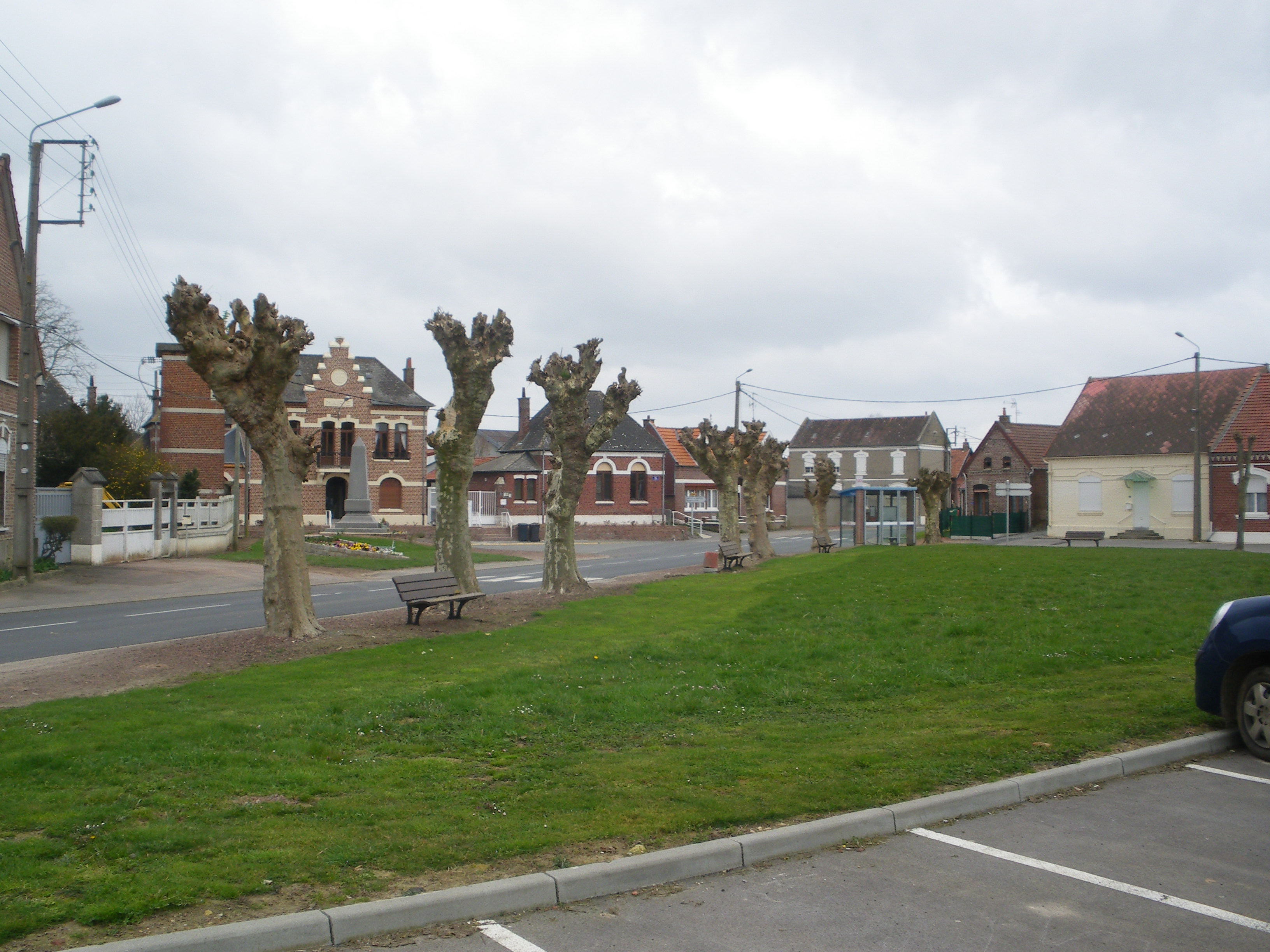 Vue de la grand-place de Mœuvres.